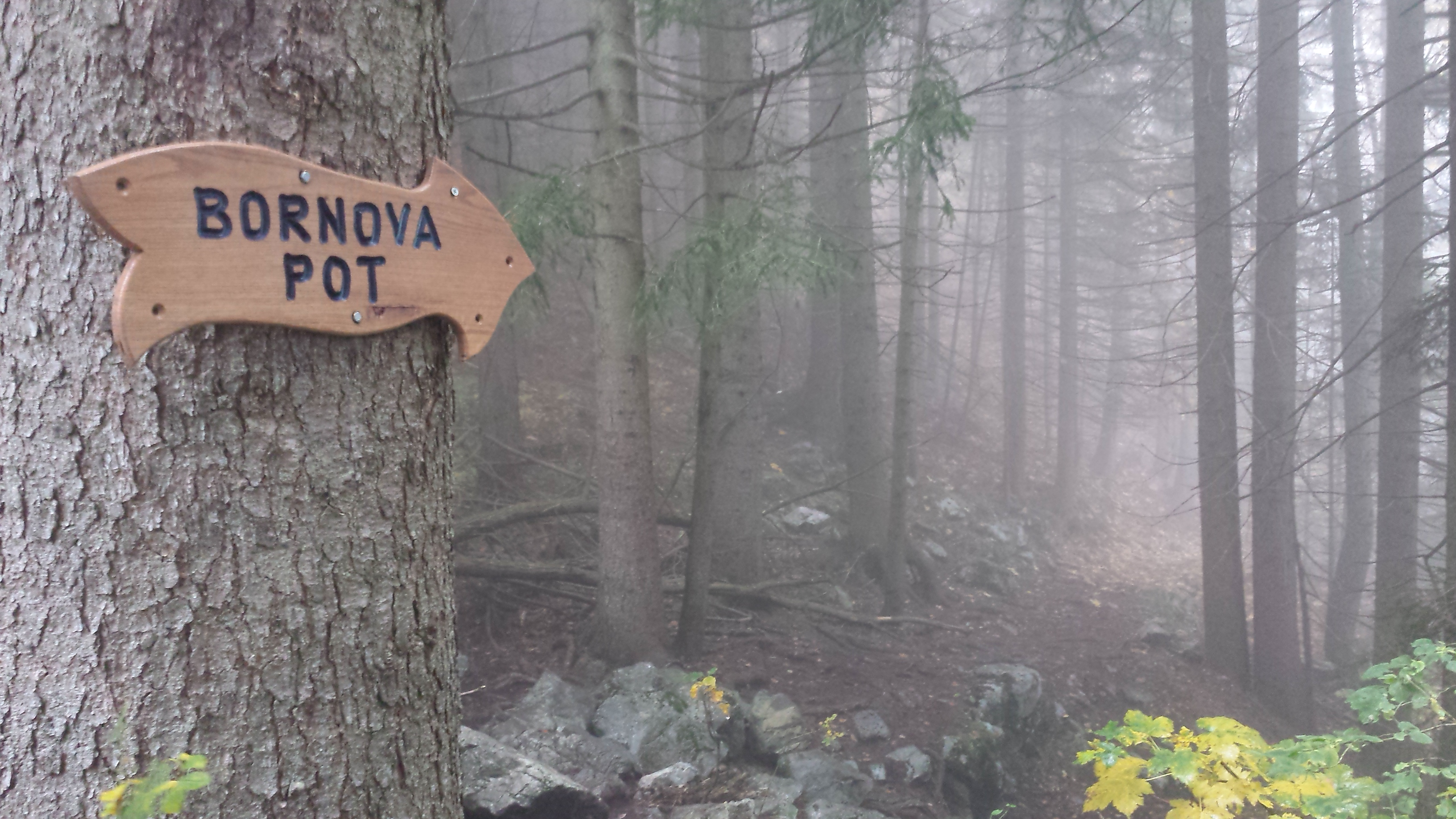 Ljubelj - Koča na planini Preval-a (Bornova pot). (Friderik Born)